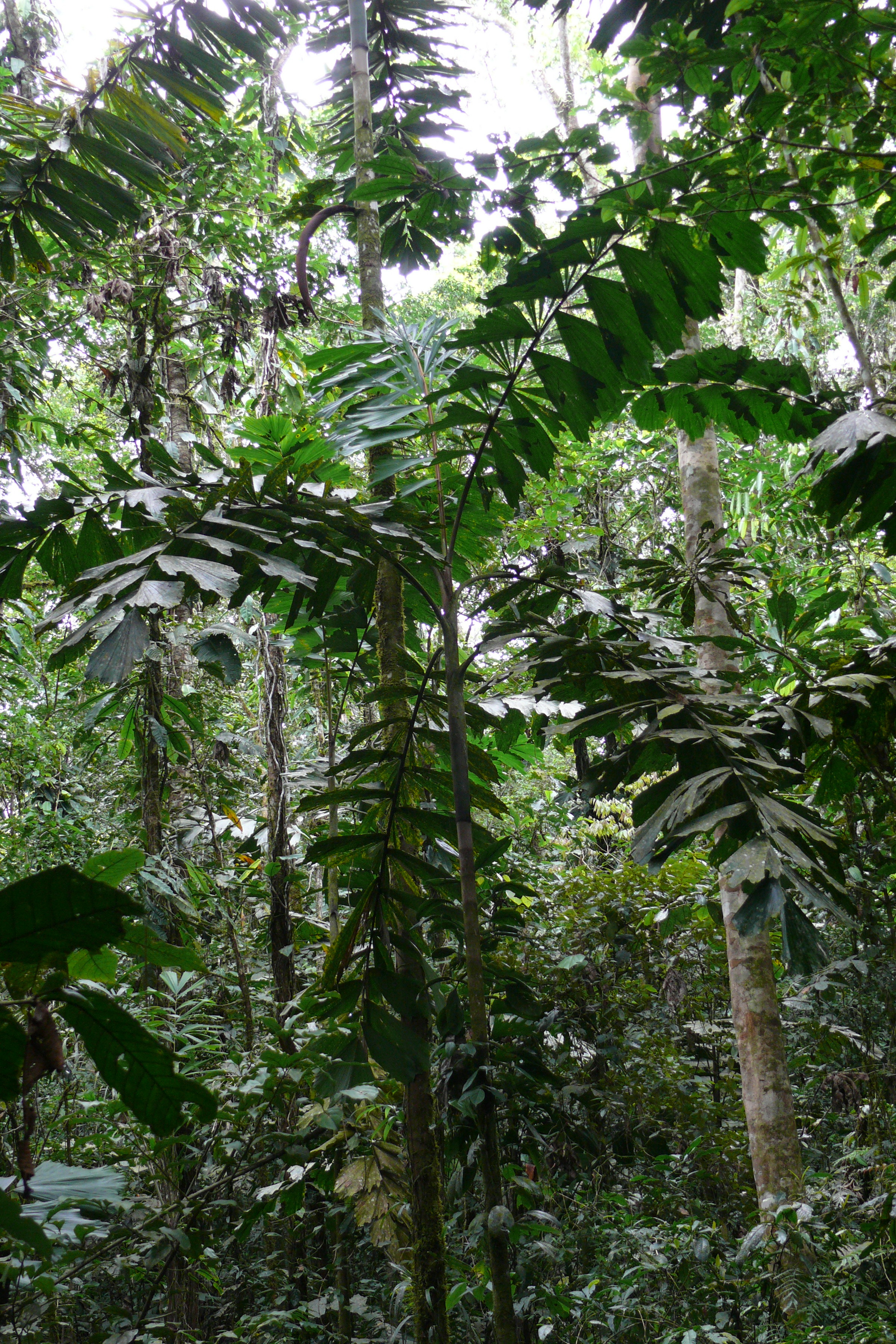 Iriartea deltoidea fotografiert im Regenwald in Ecuador in der Nähe des Río Napo